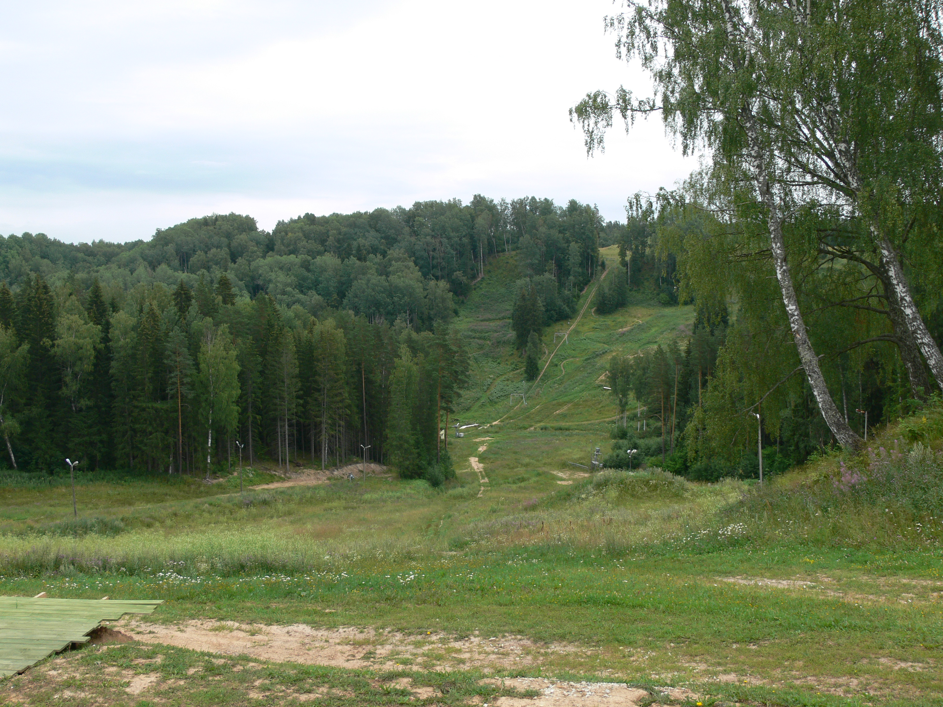 Haanja looduspark